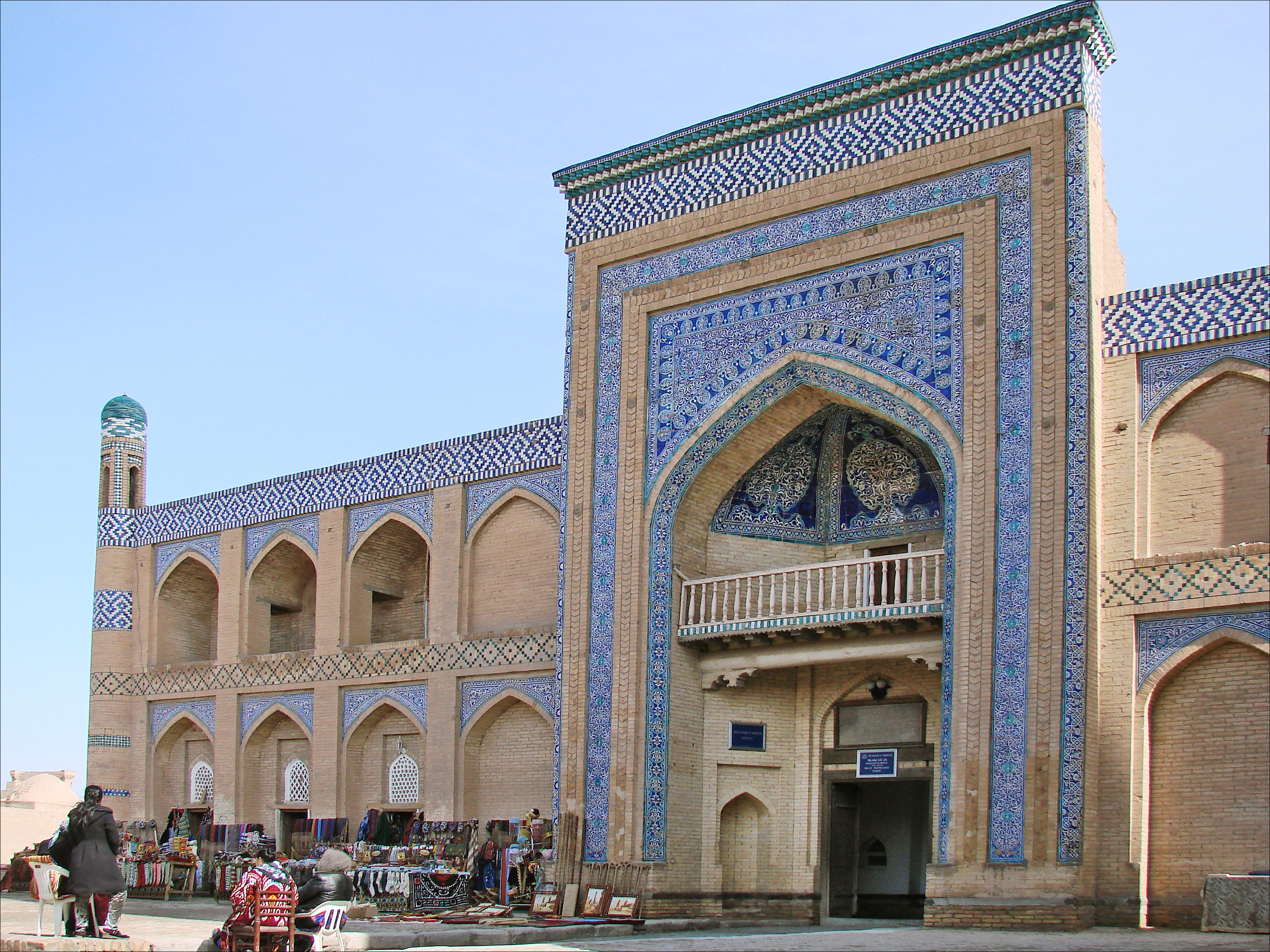 Islam-Khodja, qui a fait construire cet ensemble de bâtiments, a été vizir principal du khanat de Khiva lors du règne de Muhammad Rahim-Khan (1863-1910) et de son fils Asfendiyar-Khan (1910-1920). Il est mort assassiné pour avoir tenté de réformer le système éducatif. La médersa (madrasa), qui comprend une mosquée, dispose du plus haut minaret de Khiva (1910).